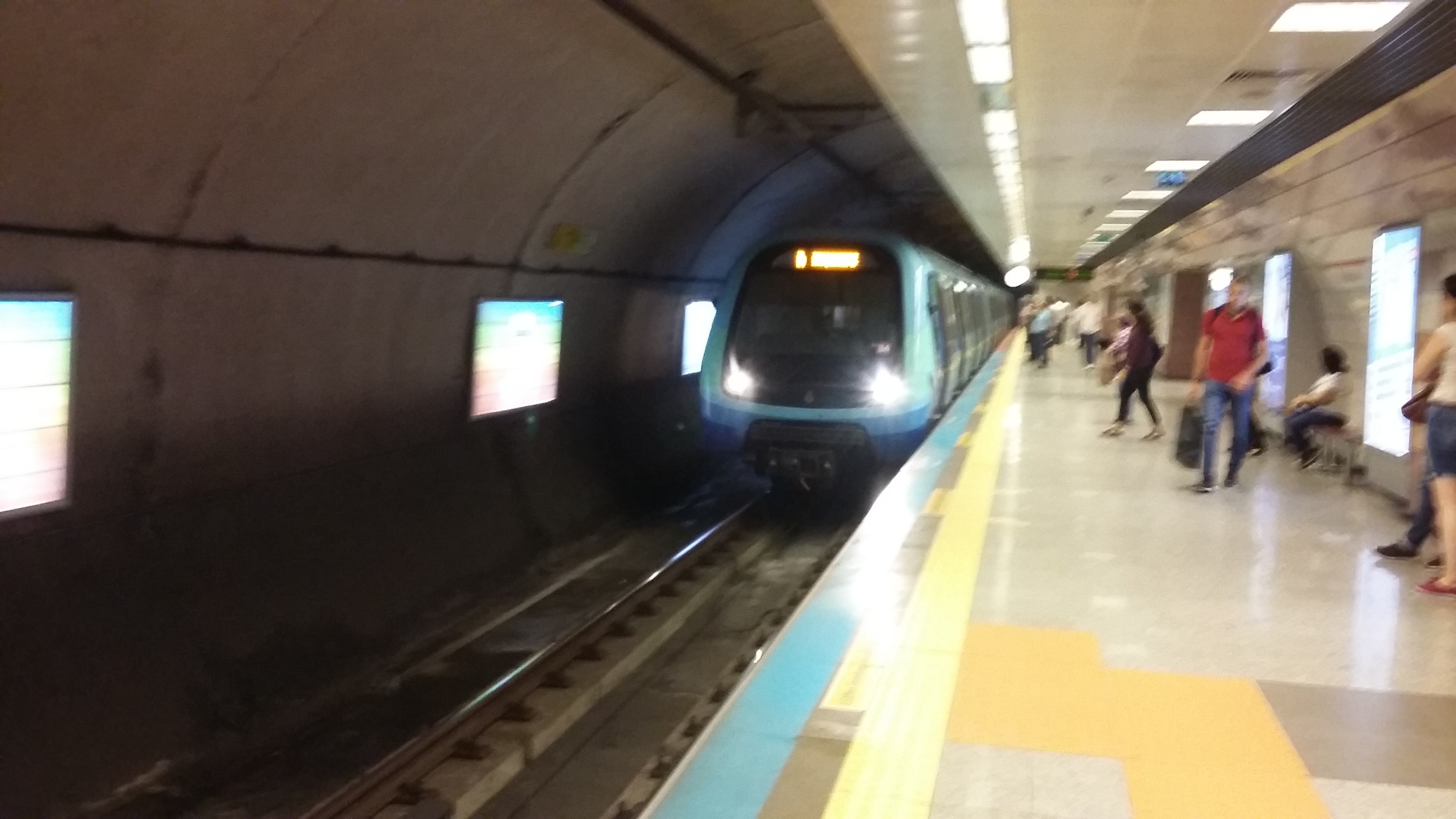 M4 Kadıköy - Tavşantepe Metrosu ünalan